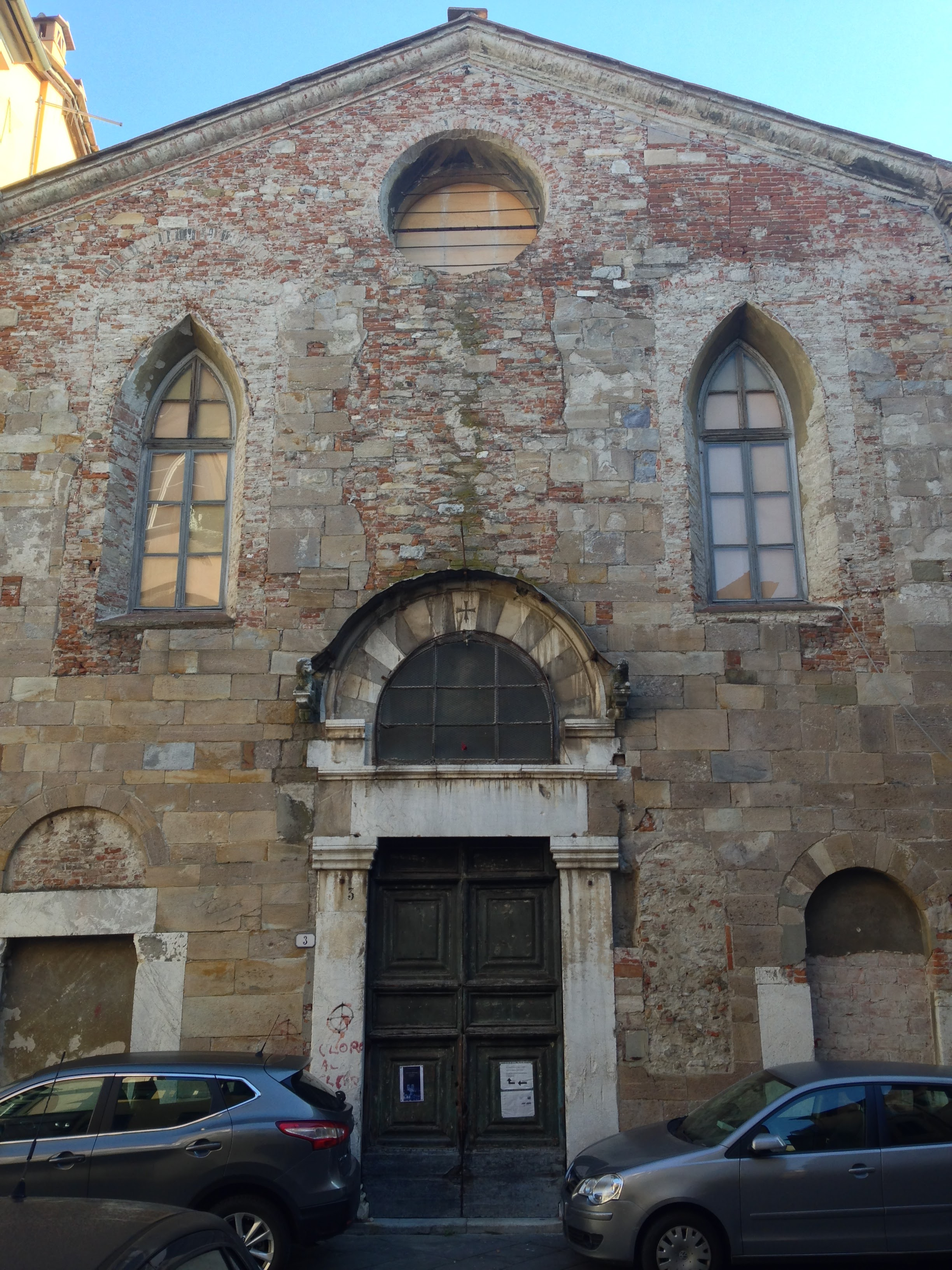 Chiesa di San Matteo (facciata), Piazza S. Matteo, Lucca